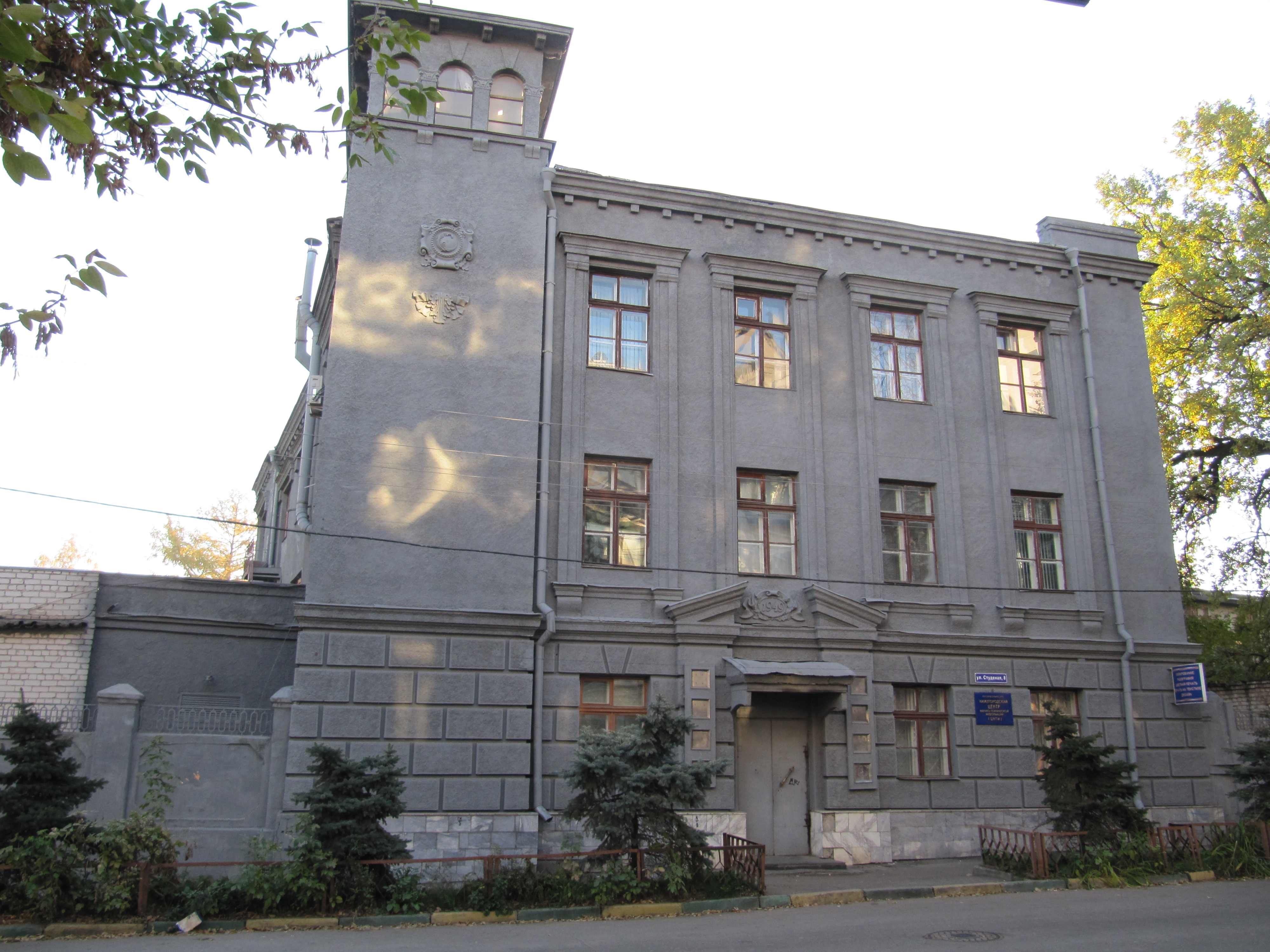 Центр научно-технической информации в Нижнем Новгороде - бывший католический храм. улица Студёная, 8, Нижний Новгород